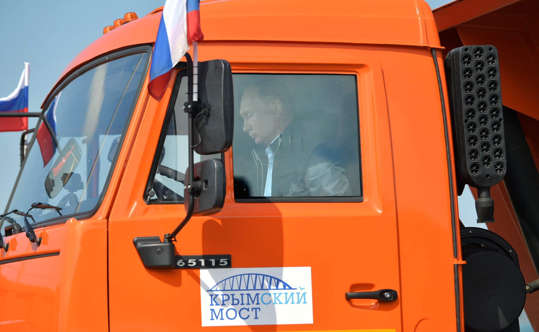 Открытие автодорожной части Крымского моста